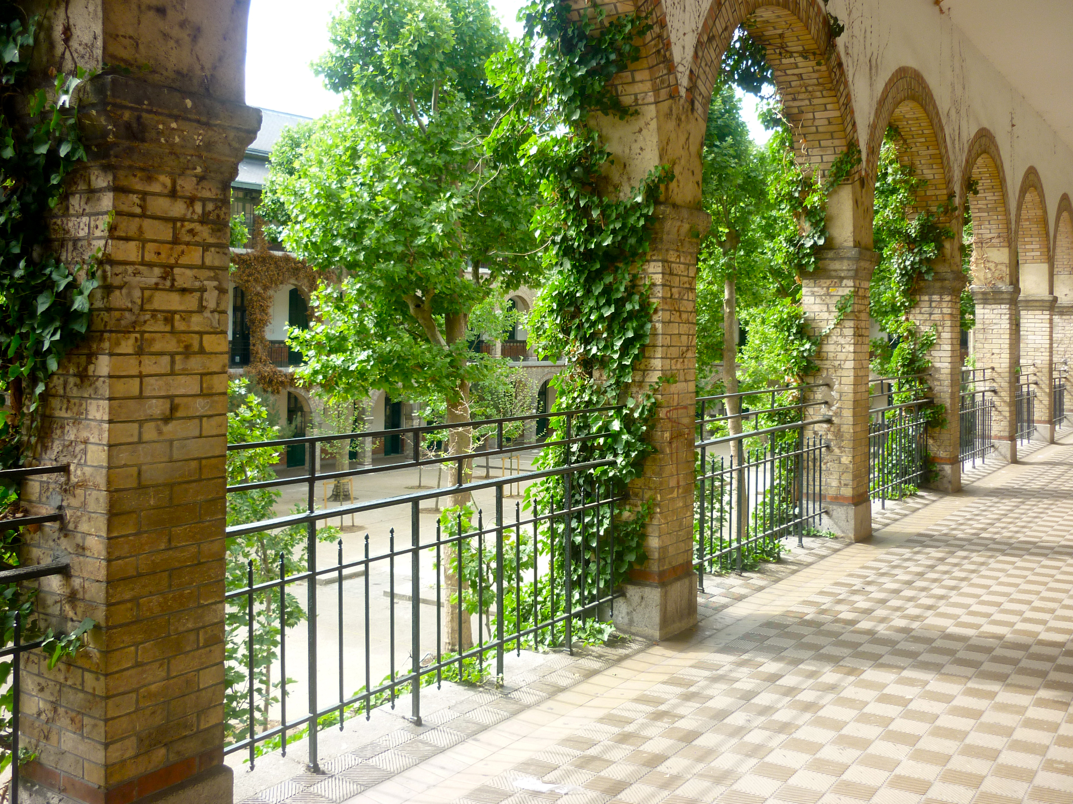 Arcades du lycée Molière (Paris), cinquième vue